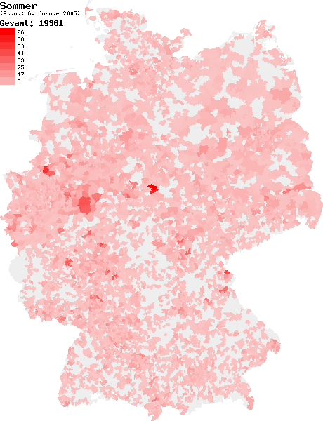 Verteilung des Nachnamens Sommer in Deutschland nach dem Telefonbuch mit Stand vom 6. Januar 2005